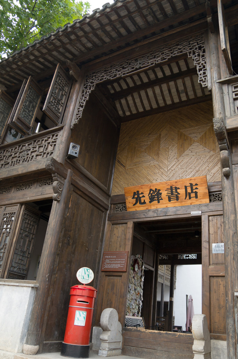 先鋒書店無錫店